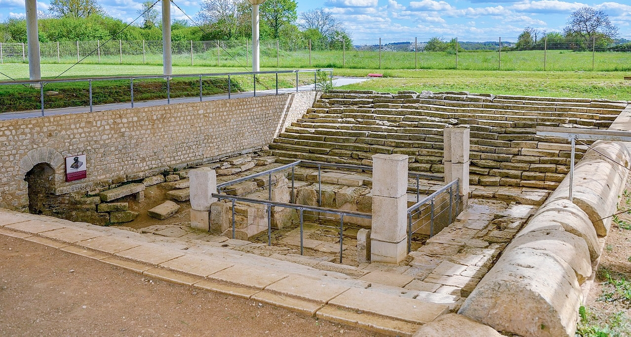 Fontaine du site archéologique d'Argentomagus, à Saint-Marcel.